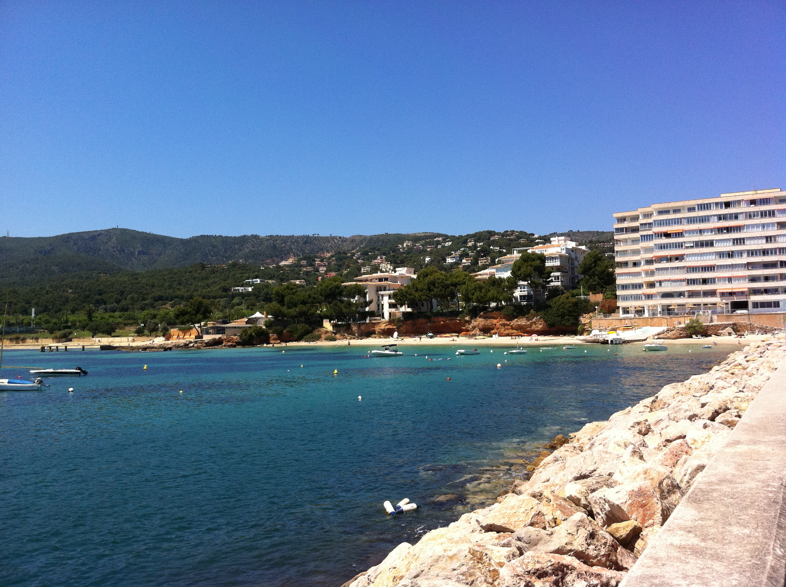 Platja de Portals Nous (Mallorca)